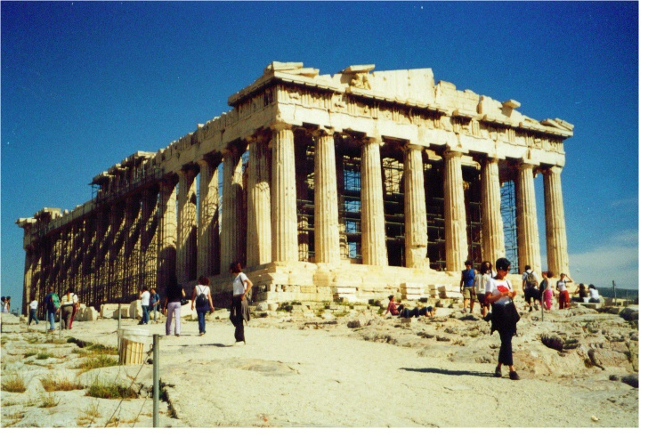 Der Parthenon in Athen